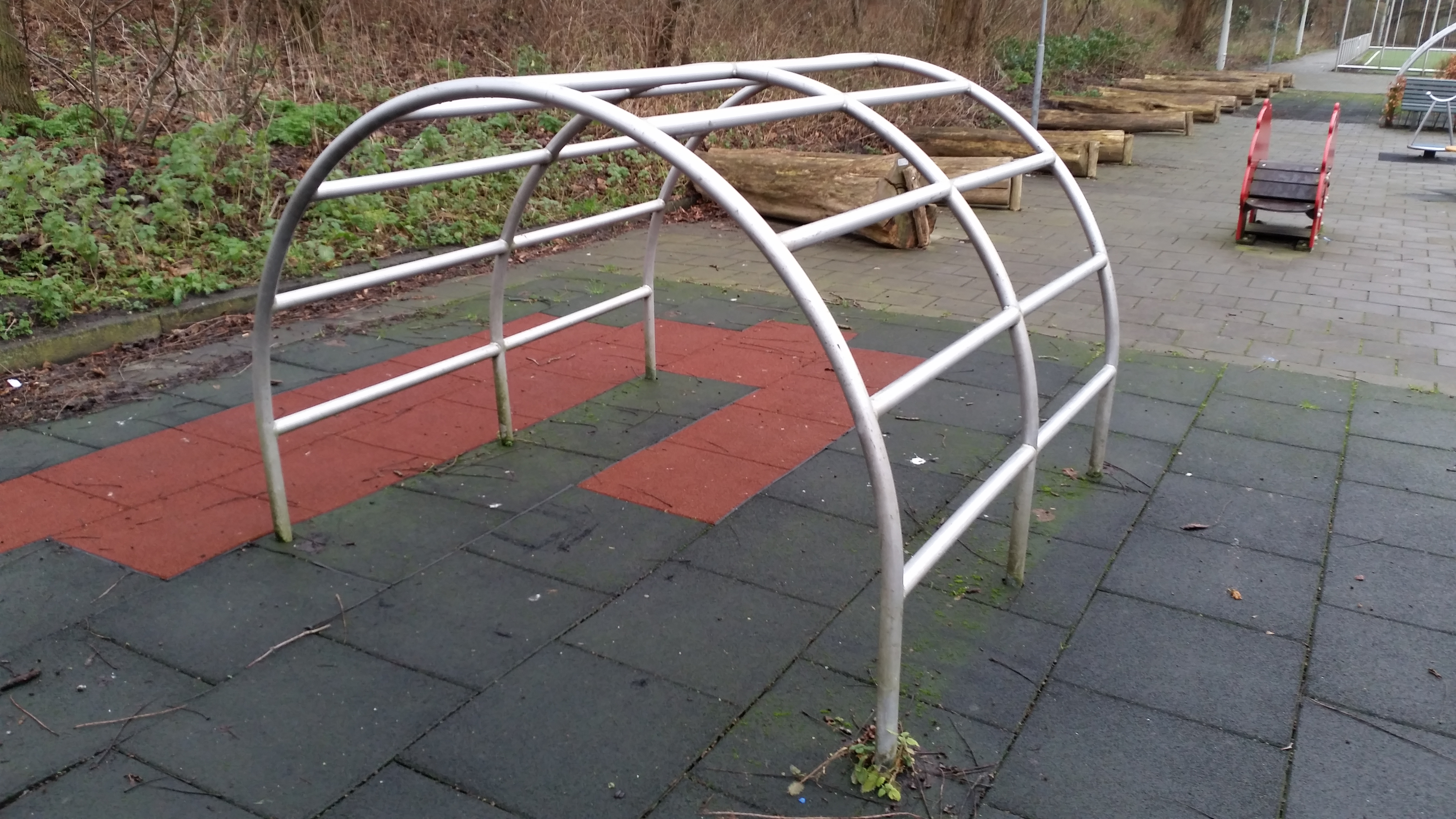 Tunnel-klimrek van Aldo van Eyck aan de Kramatweg, Amsterdam-Oost , beide modellen staan daar